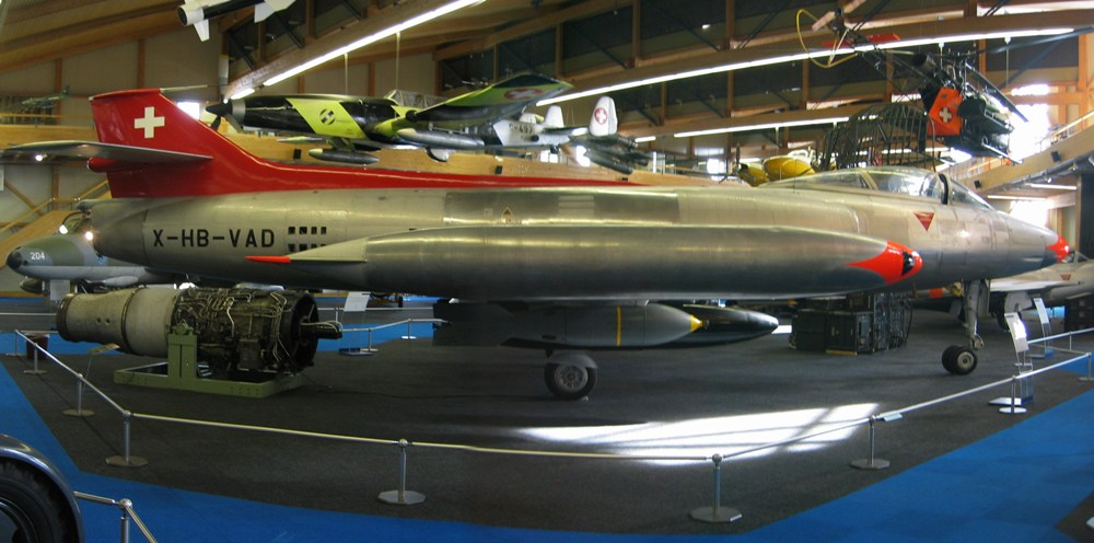 P-16 Mk III auf dem Militärflugplatz Dübendorf